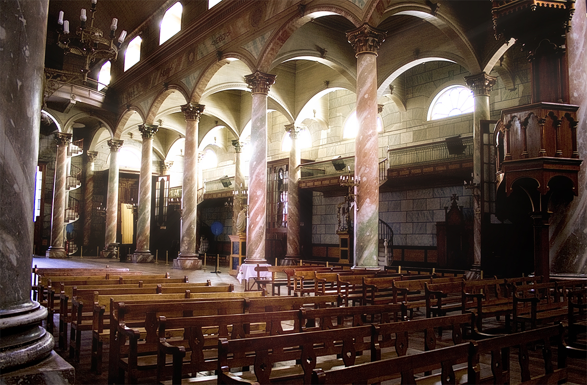 Iglesia grande de Andacollo This is a photo of a national monument in Chile: 604